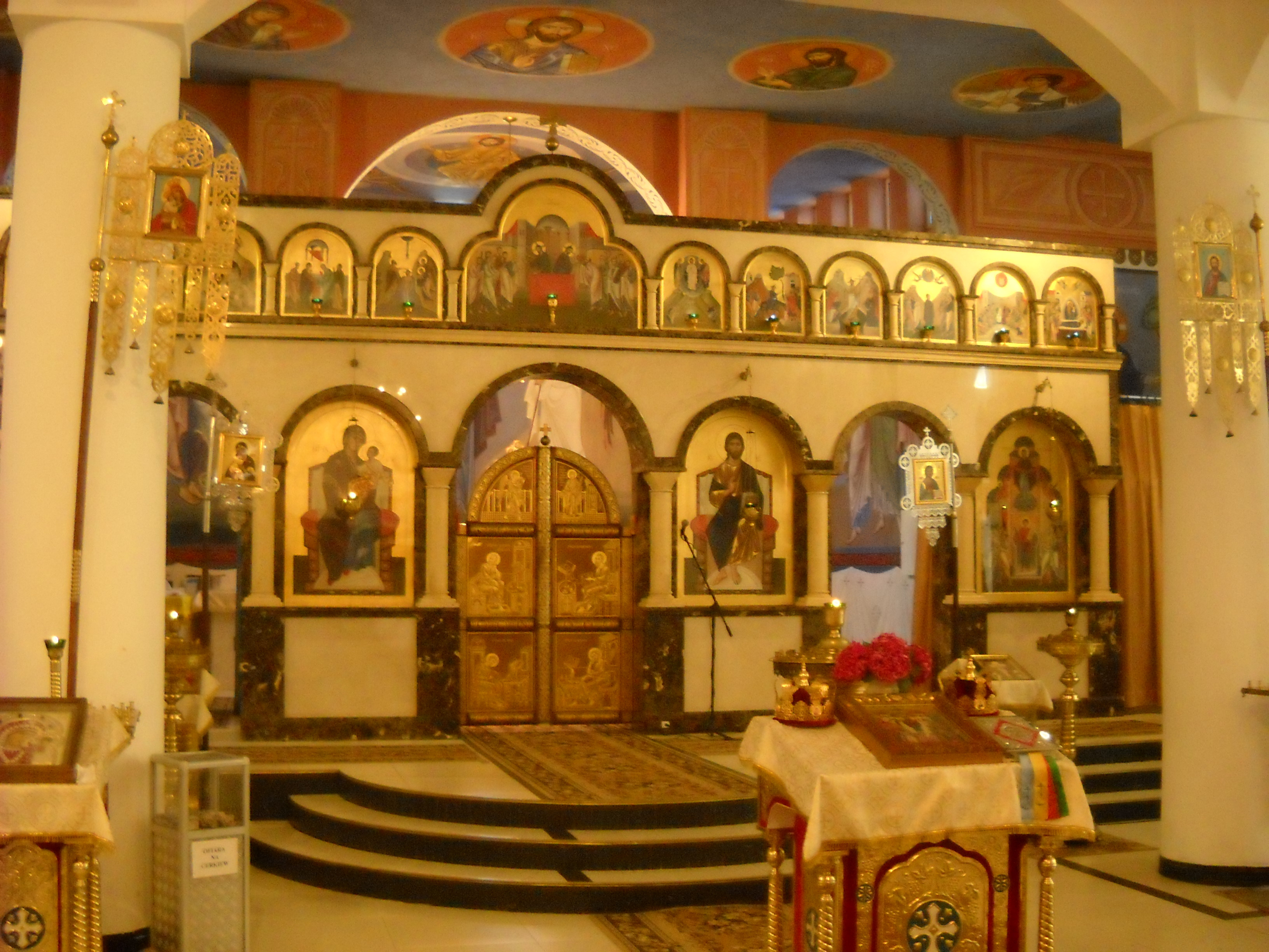 Wnętrze (Ikonostas) dolnej cerkwi św. Jerzego w Białymstoku